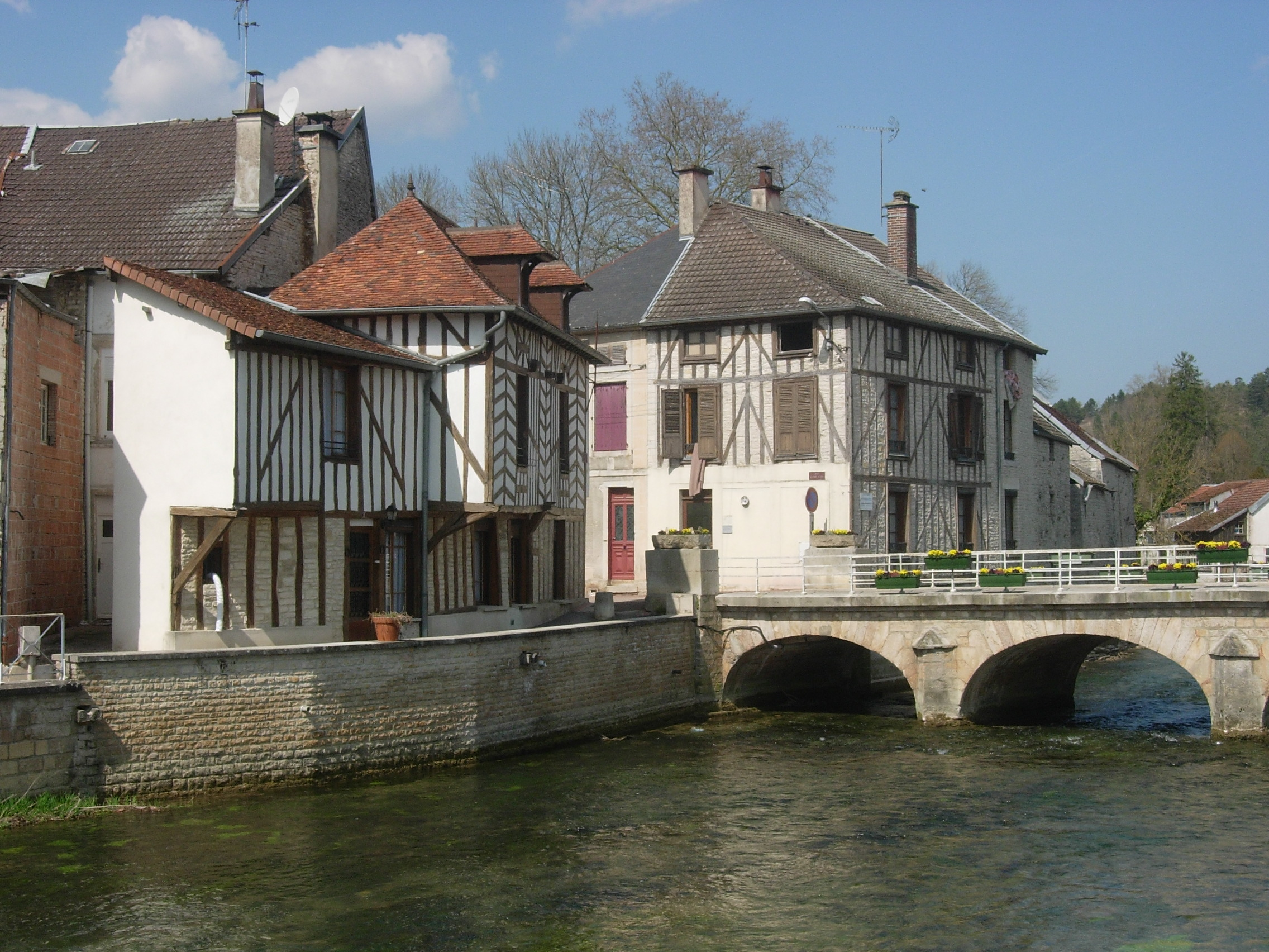 Essoyes et son pont sur l'Ource